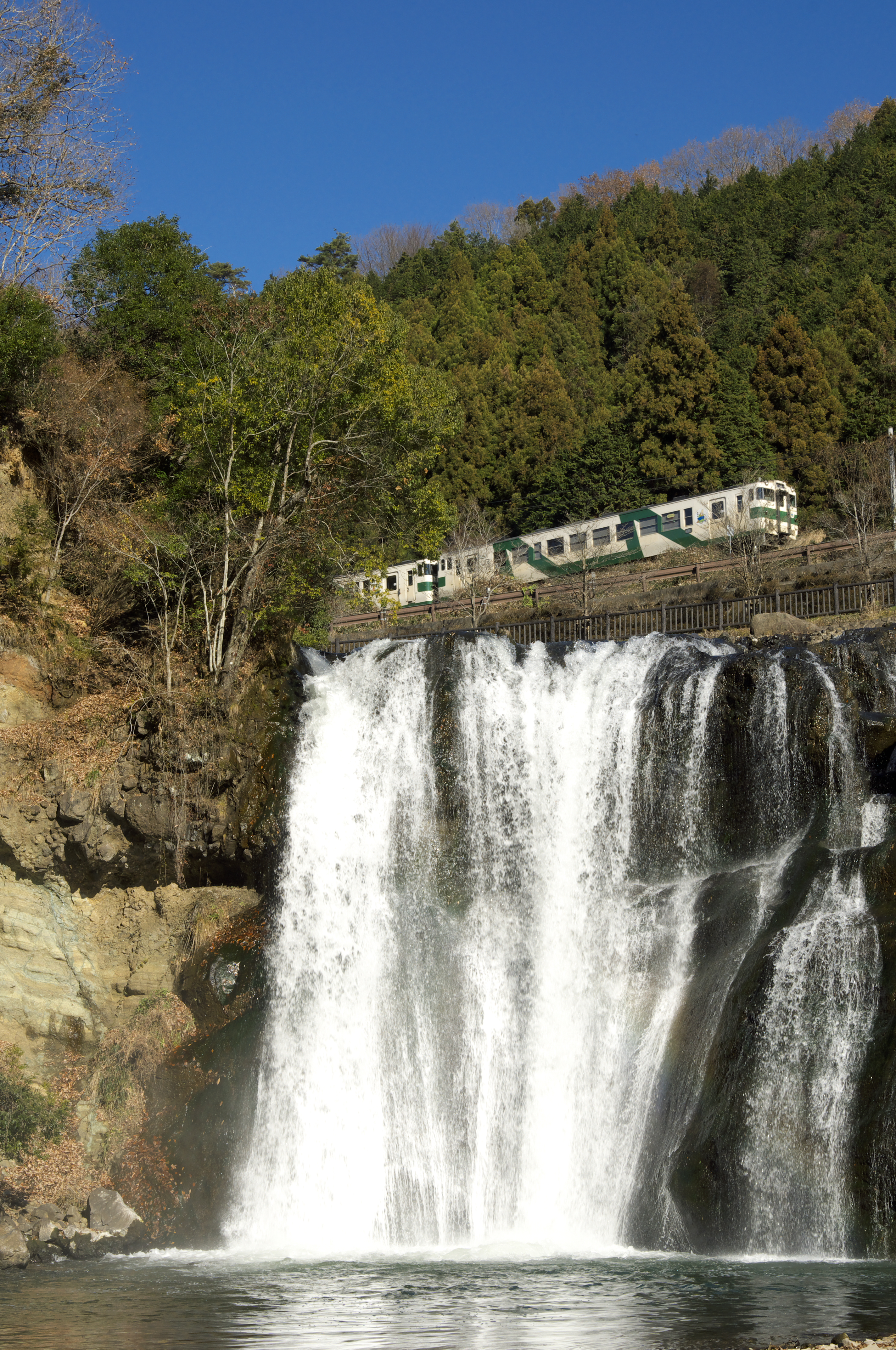 龍門の滝を行く烏山線の列車 2011.12.13 烏山線 滝〜烏山 DD51612撮影